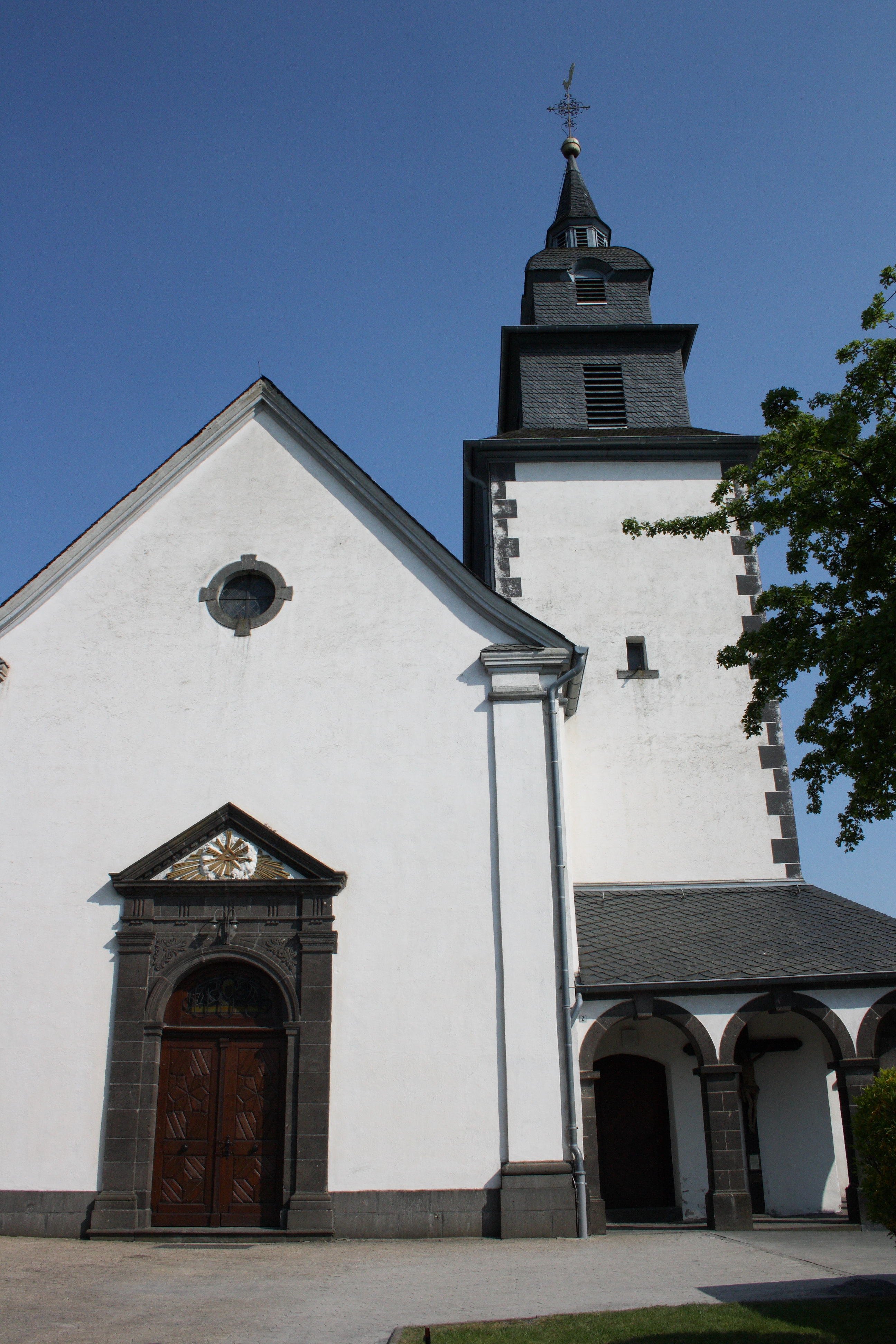 katholische Pfarrkirche St. Johannes Baptist in Sankt Johann